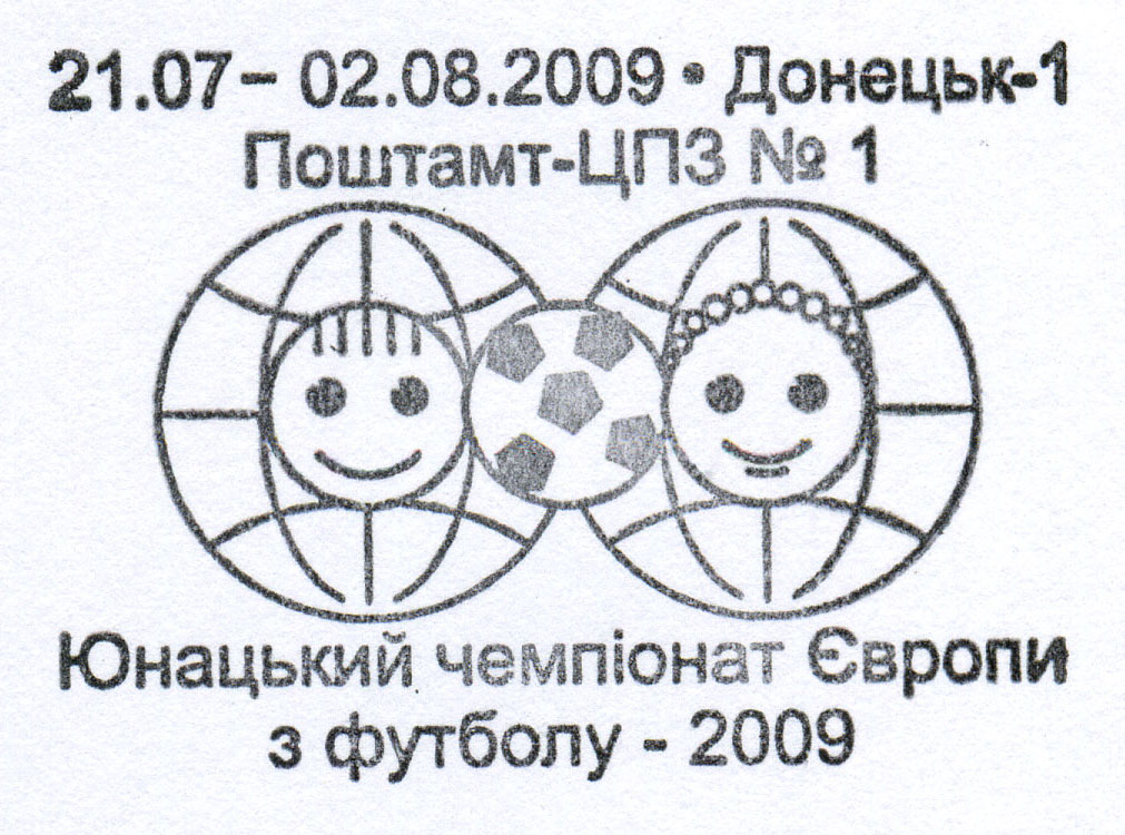 Спецгашение. 21-07-2.08.2009 Юношеский чемпионат Европы по футболу